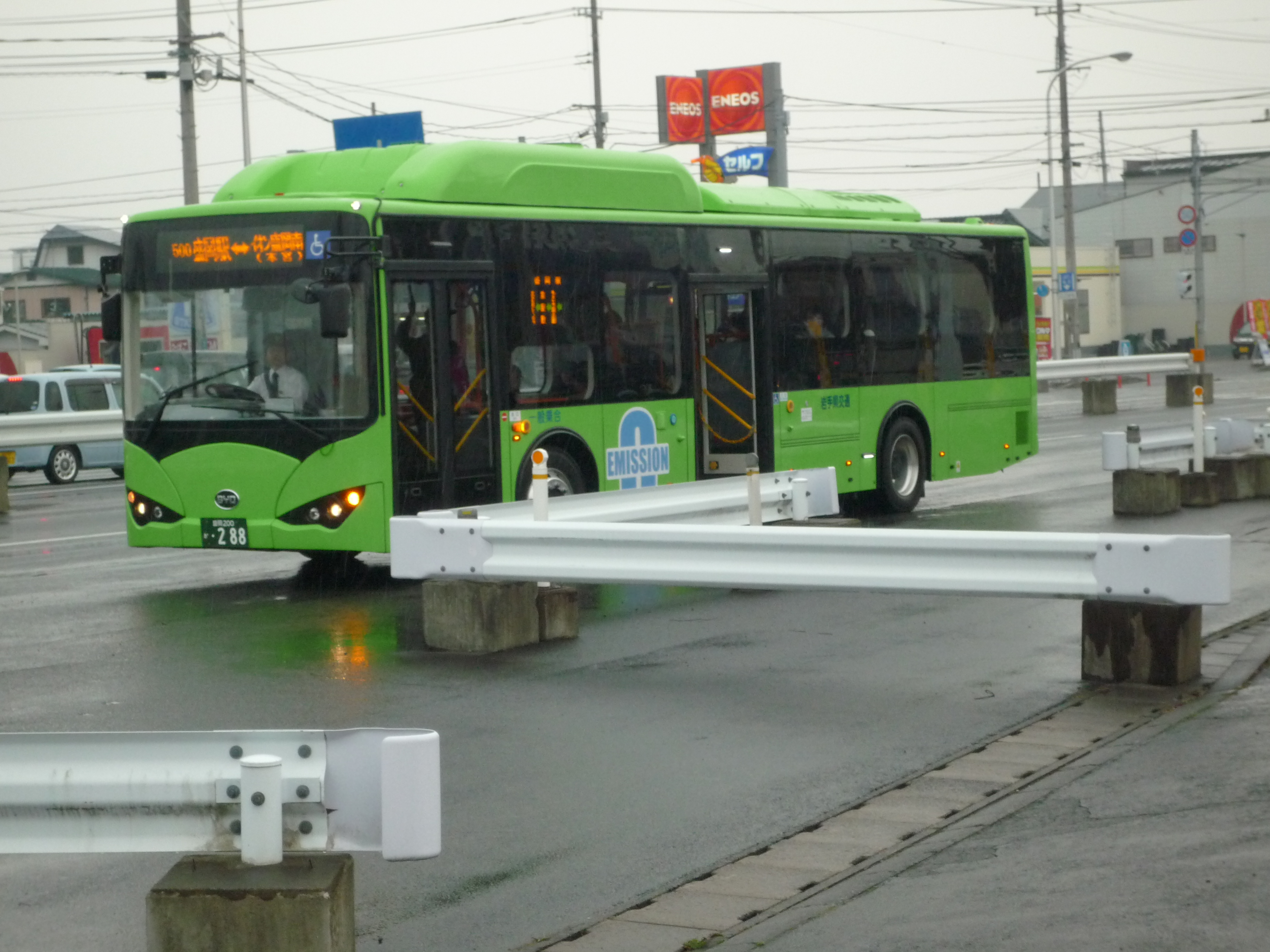 盛岡駅 - イオンモール盛岡南間の路線専用車両として運行を開始した電気バス。盛南大橋南停留所付近で撮影。